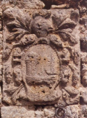 Usini, via del Duca, Stemma del Barone di Usini Giacomo Manca, XVI Sec.